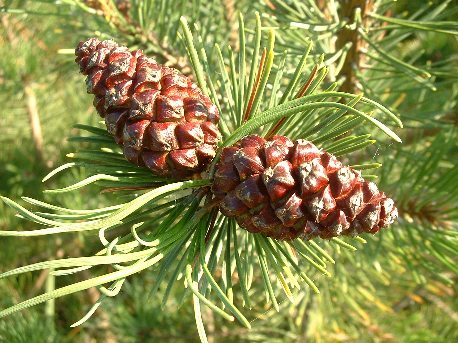 Zwei junge Zapfen einer Bergkiefer Pinus mugo.